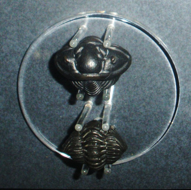 Fossil of Calymene, an extinct arthropod-- Took the photo at Natural History Museum, London